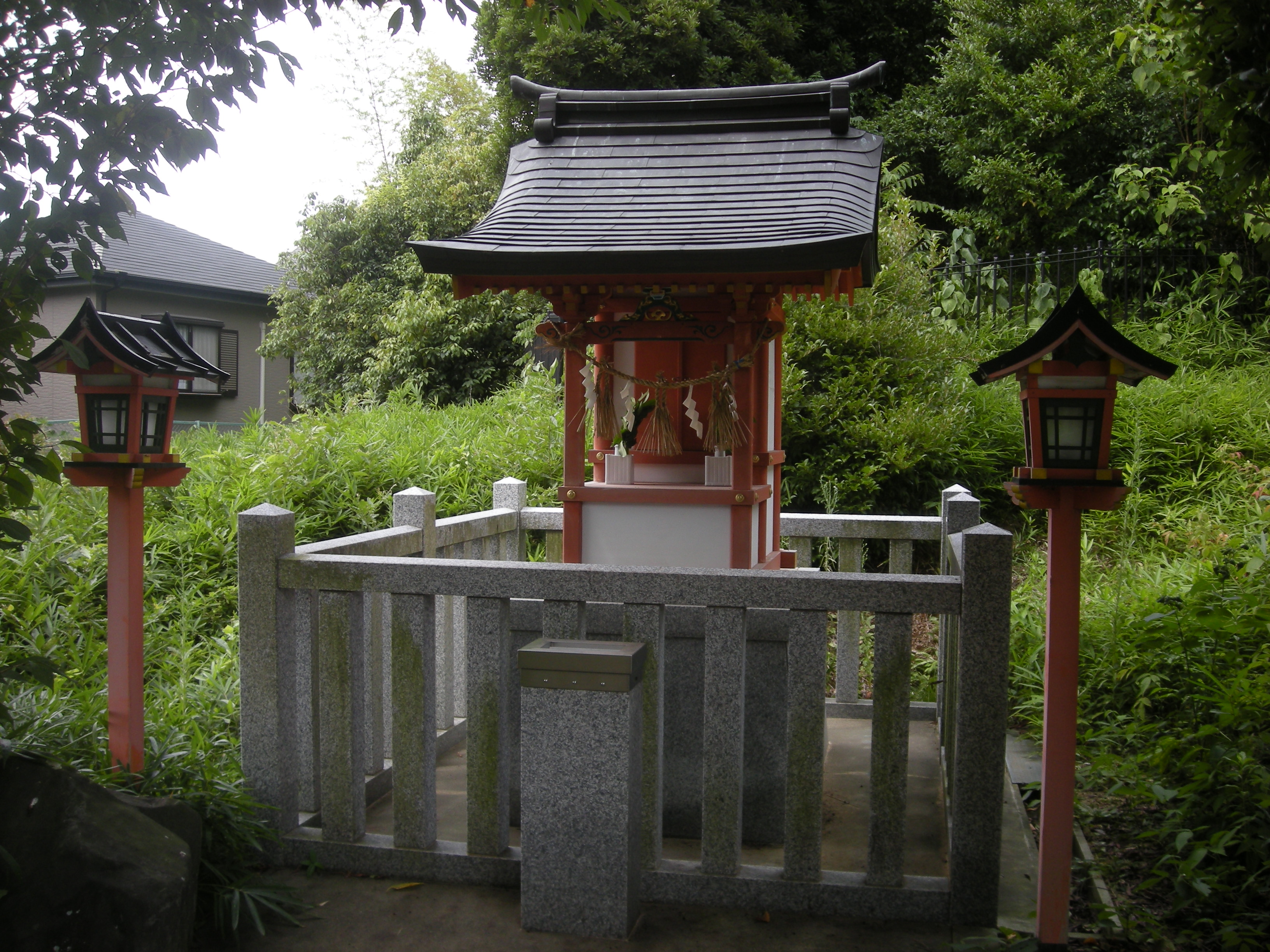 太田神社 稲荷社